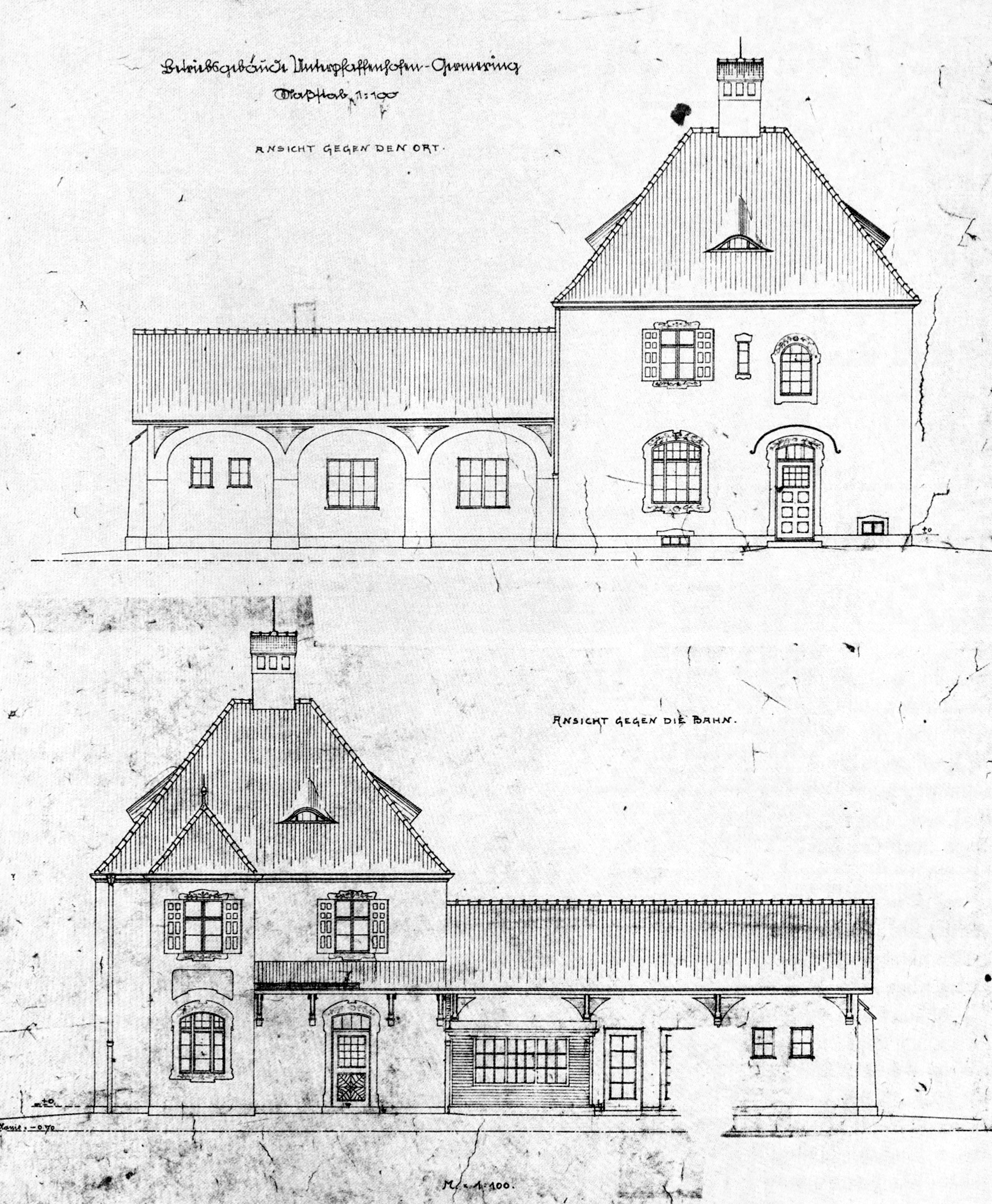 Aufriss des Empfangsgebäudes von Unterpfaffenhofen-Germering von der Straßen- und Gleisseite